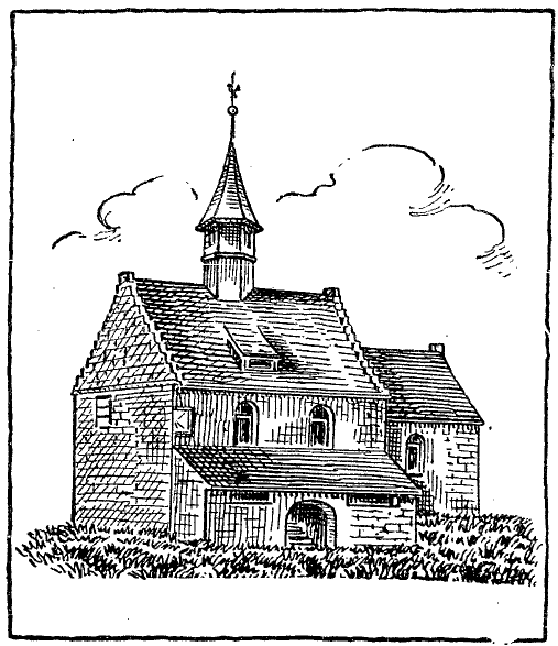 Alte Kirche von 1763 in Berzdorf auf dem Eigen.